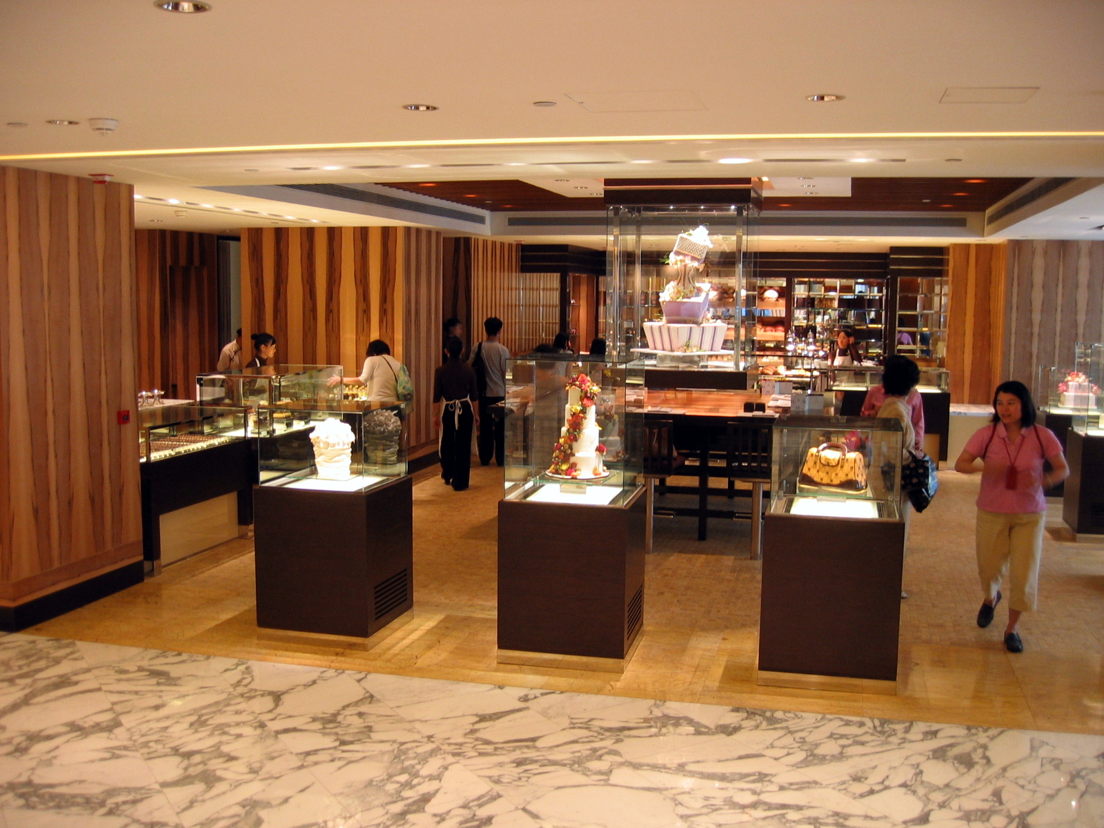 Mandarin Oriental Hong Kong Bakery Shop